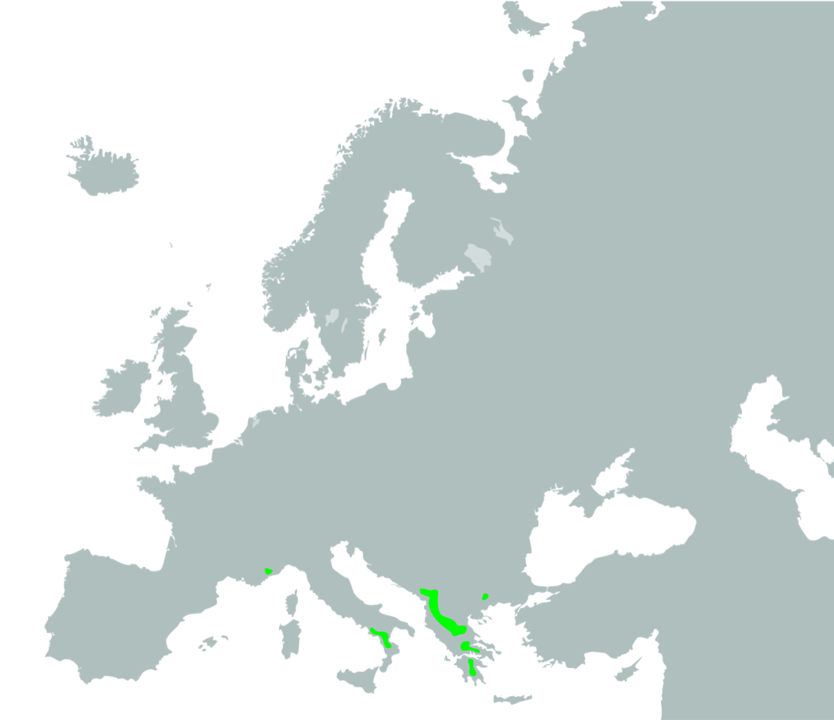 Rasprostranjenje dlakavocvetne masnice